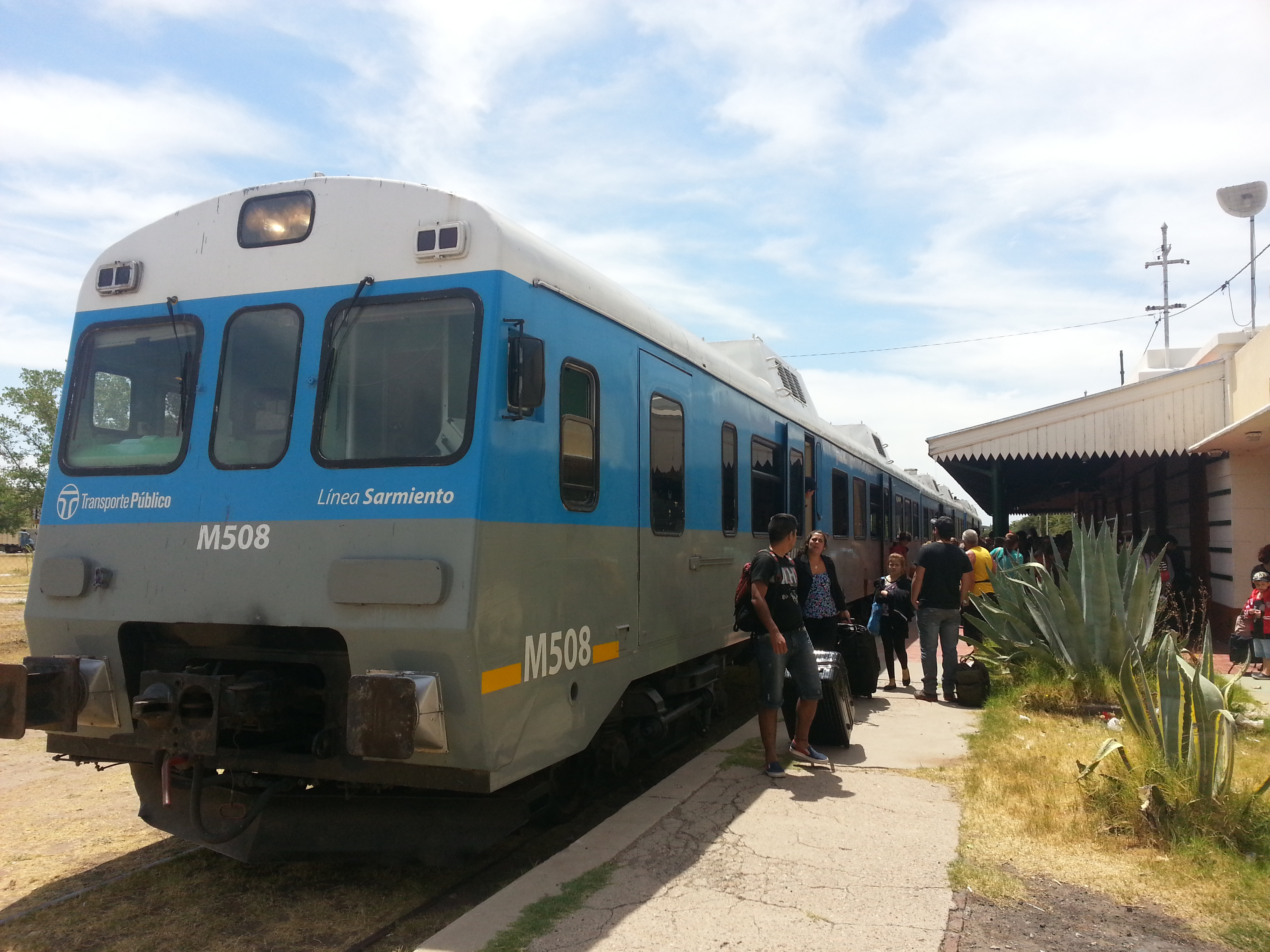 Coche-motor CAF Serie 593 ex RENFE detenido en estación Santa Rosa (La Pampa, Ferrocarril Sarmiento). Enero de 2015.